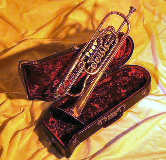 Gebrüder Alexander model 19 bass trumpet in C